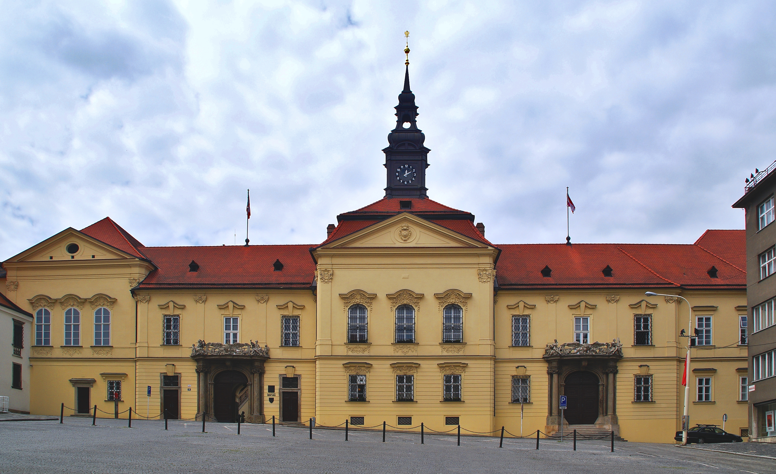 Nová radnice (Magistrát města Brna) na Dominikánském náměstí v Brně.